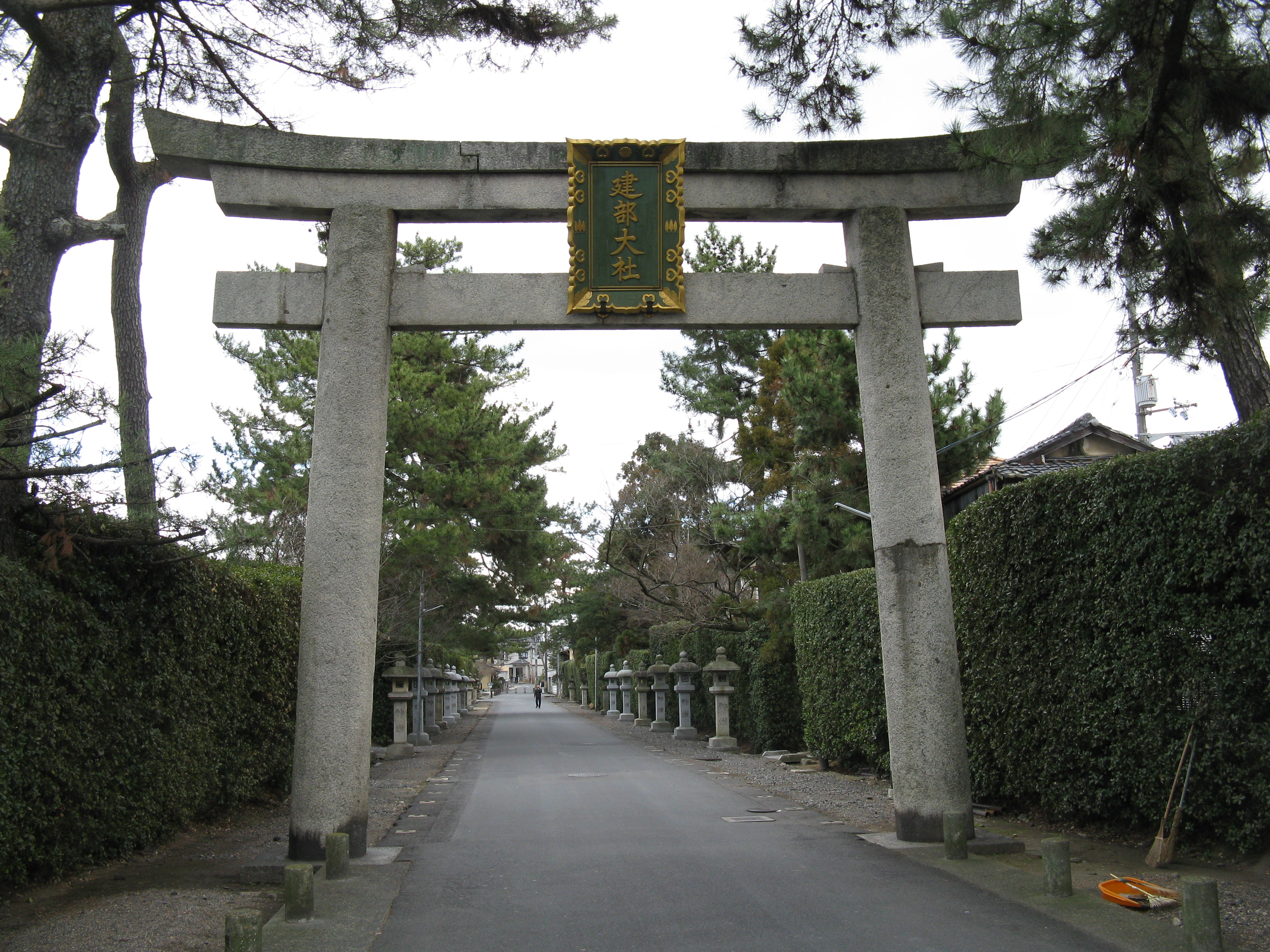 建部大社 参道